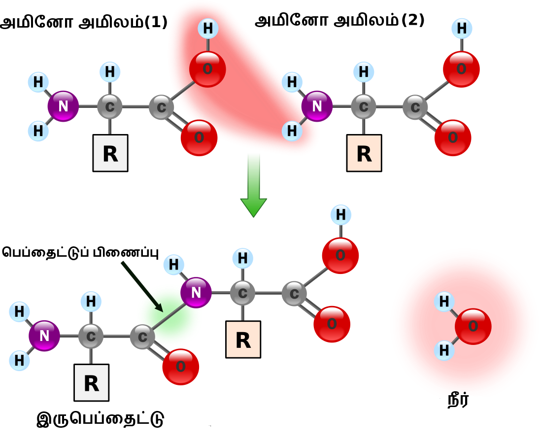 இரு அமினோ அமிலங்கள் ஒடுக்கற் தாக்கத்துக்குட்பட்டு ஒரு இரு பெப்தைட்டையும் நீர் மூலக்கூறையும் உருவாக்கல்.